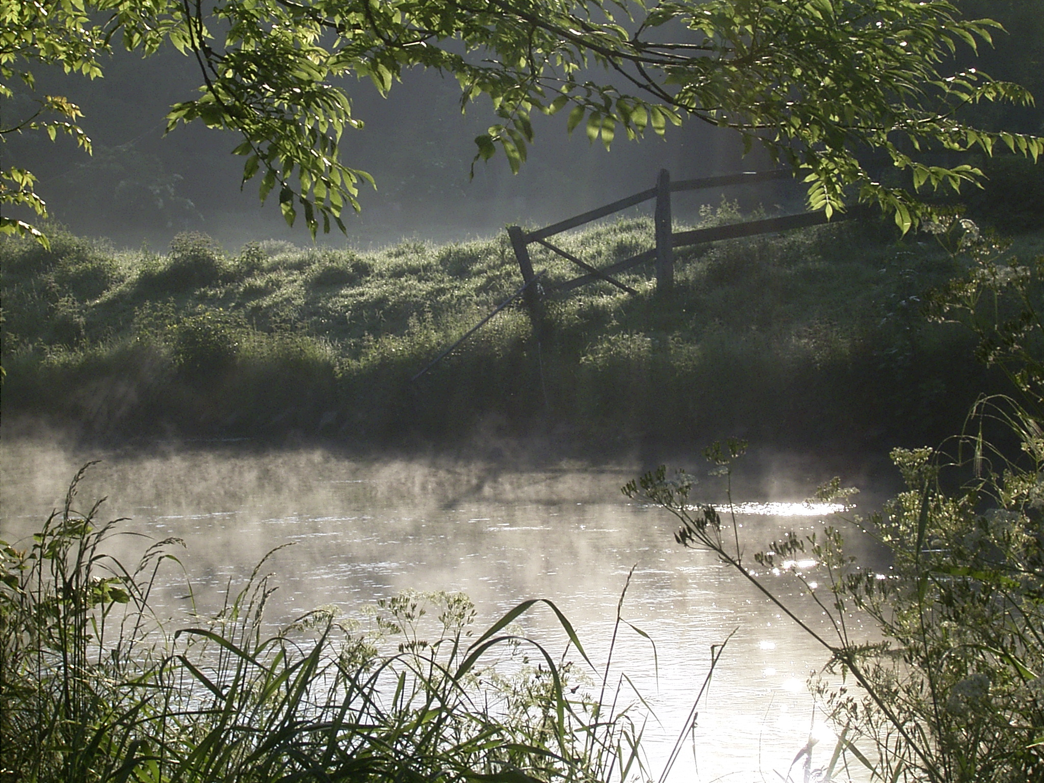 Erft, Grevenbroich, Fluss